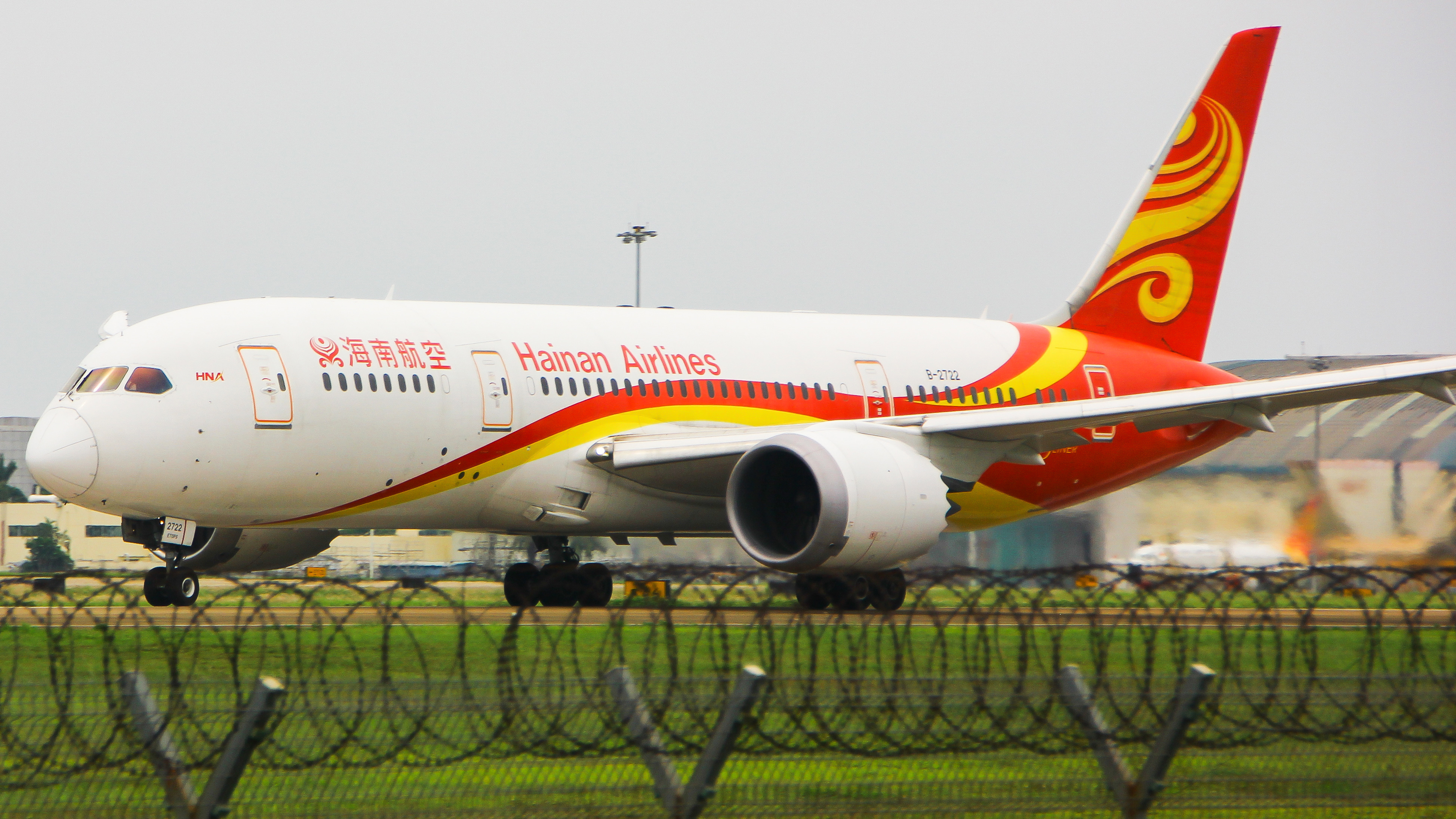 中文（中国大陆）: 海南航空波音787-8（B-2722）在海口美兰机场